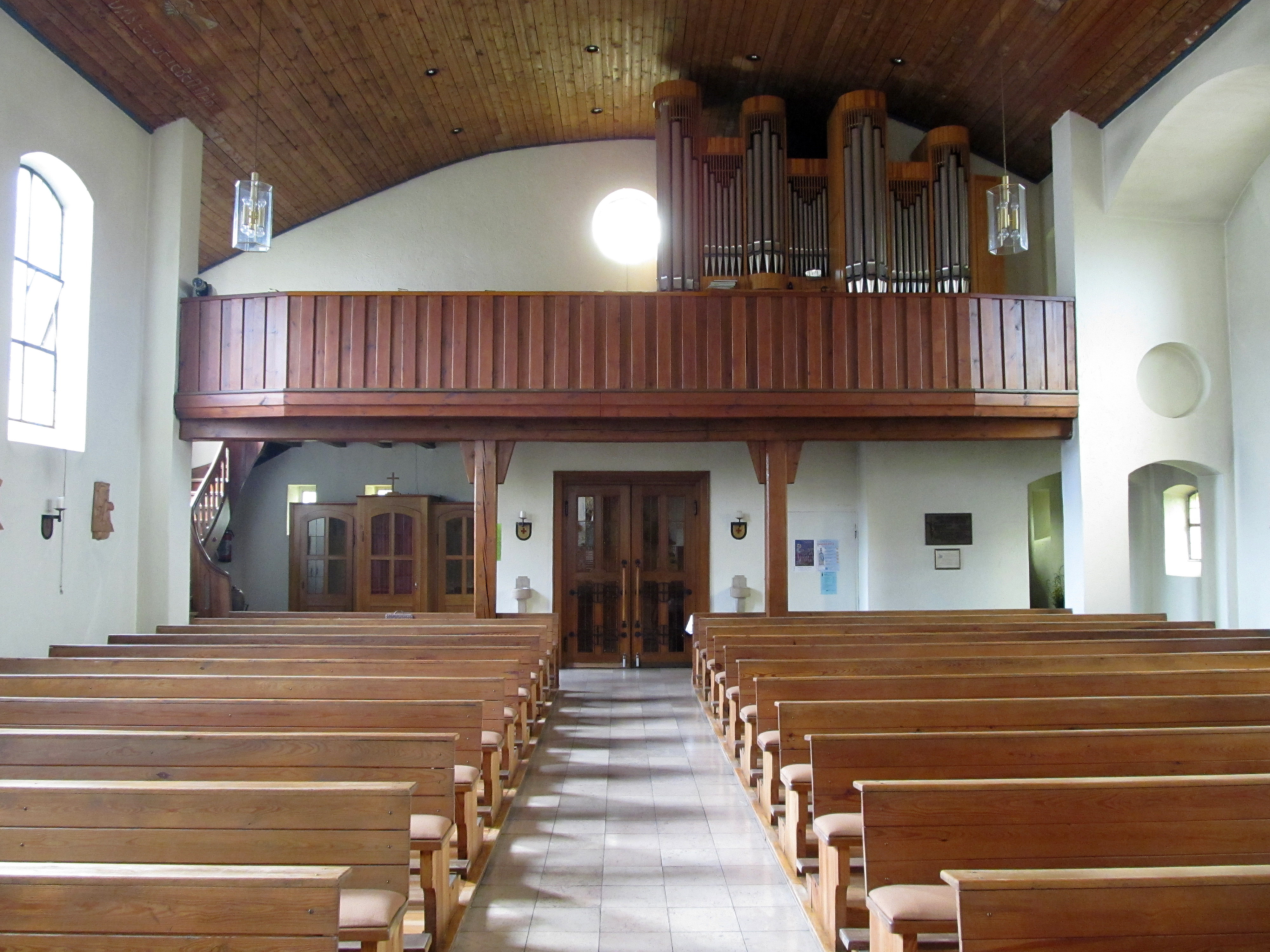 Blick ins Innere der katholischen Pfarrkirche "Bruder Klaus" in Niedergailbach, Gemeinde Gersheim, Saarland